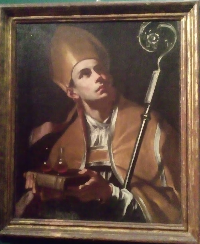 San Gennaro (Catania), conservato al castello ursino